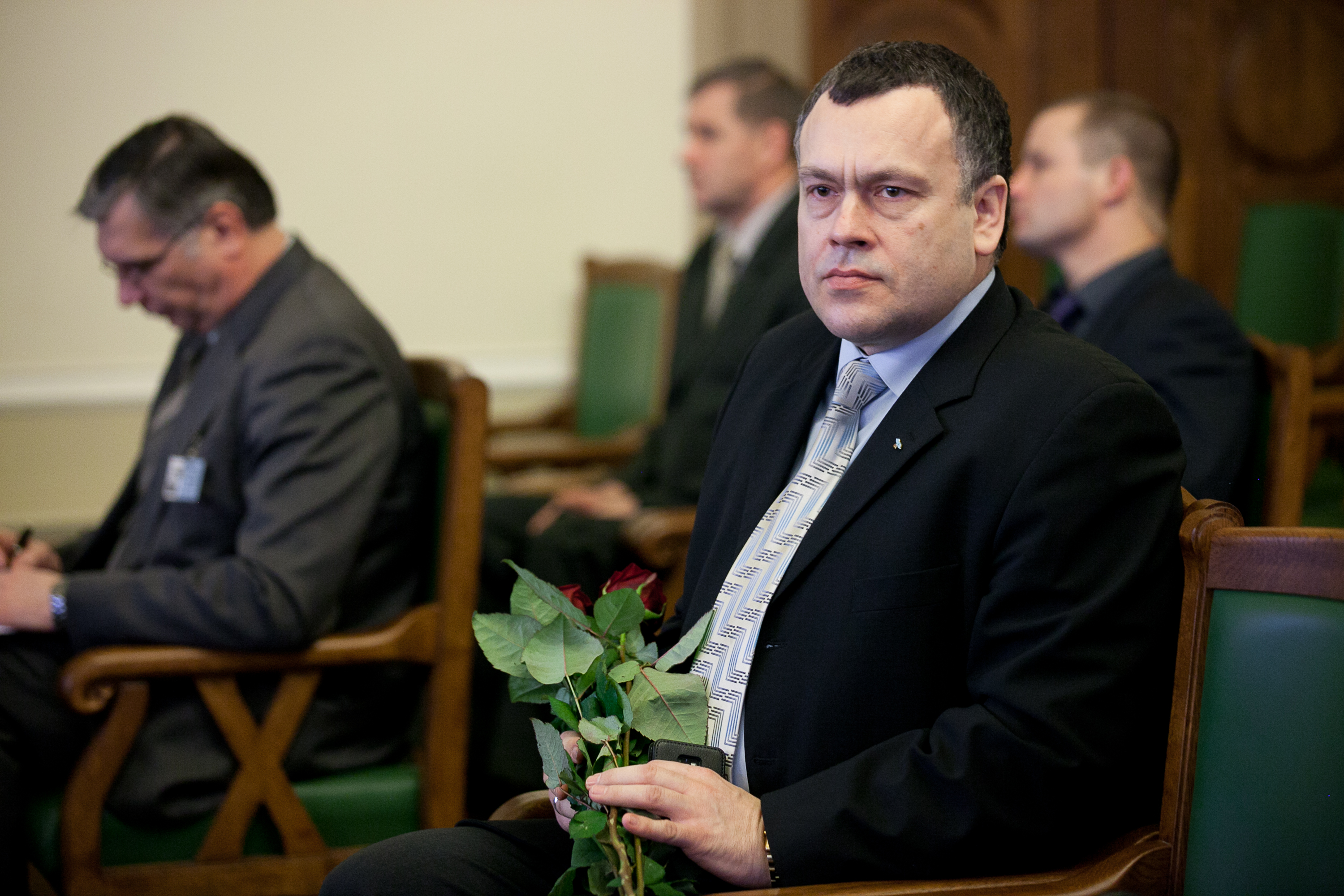 2012.gada 22.marts. Darbs Saeimas sēdē. Foto: Ernests Dinka, Saeimas Kanceleja